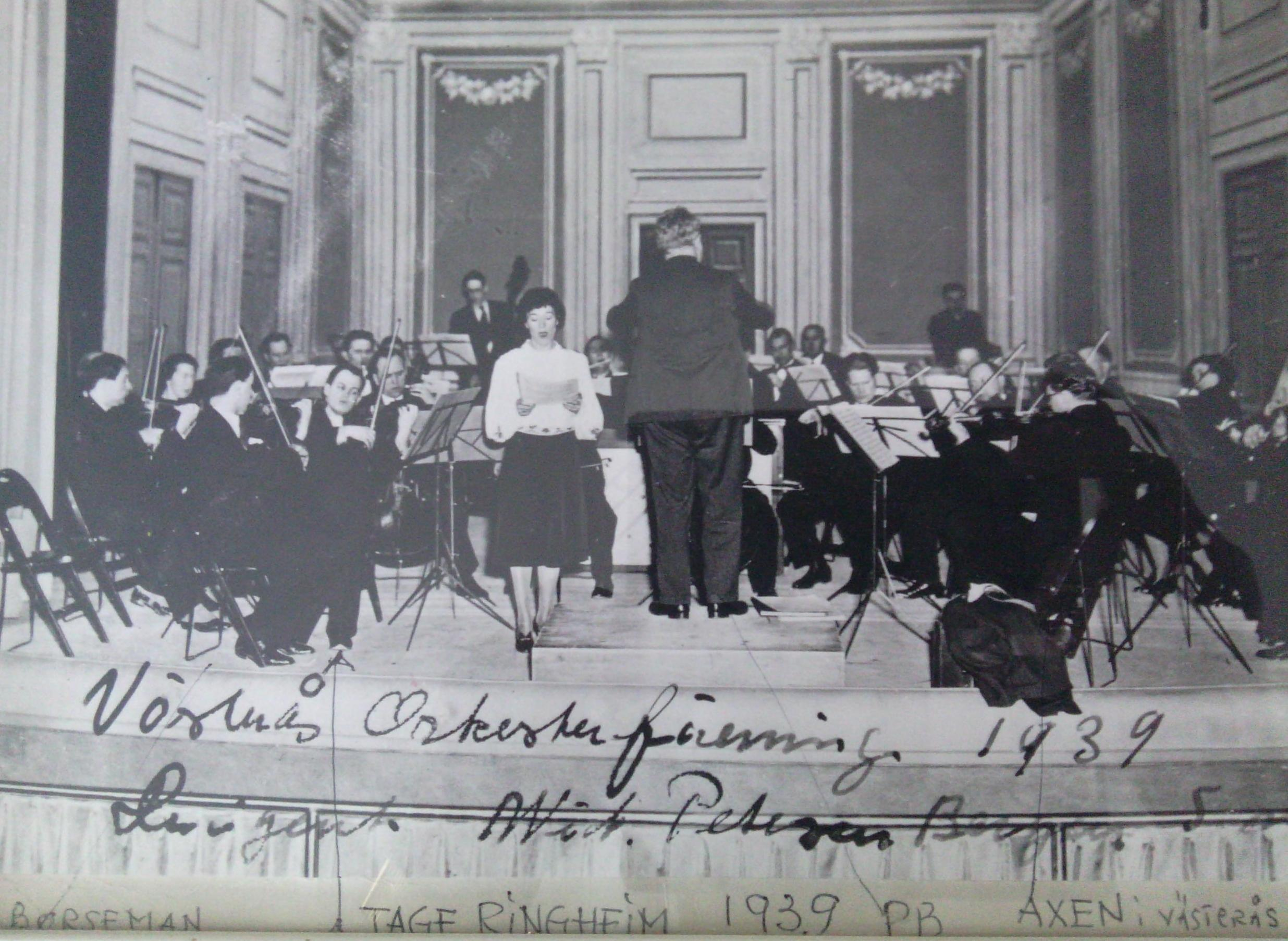 Västerås orkesterförening 1939, Enligt honom själv med Petterson Berger.